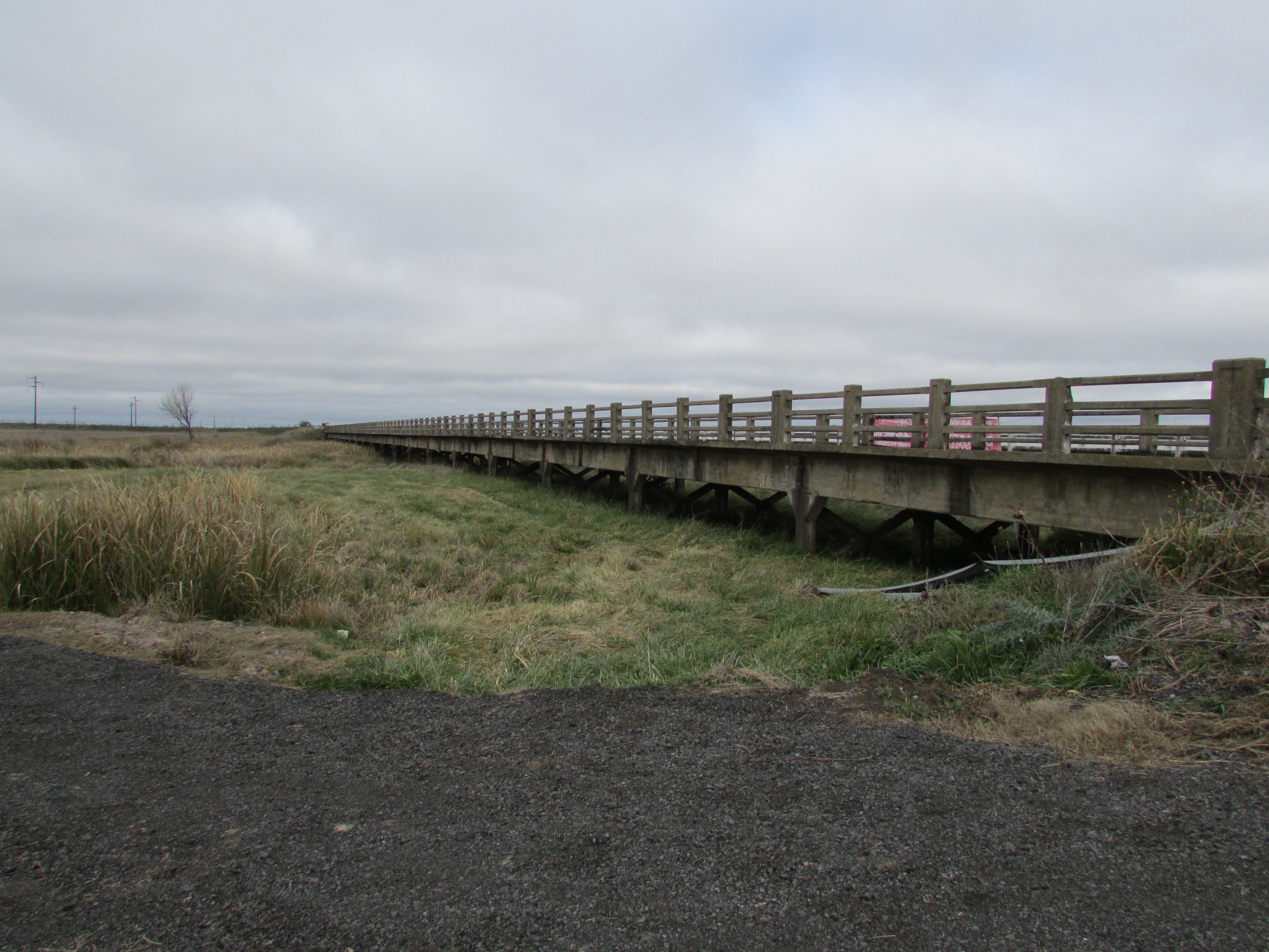 Antiguo puente de la ruta 2 sobre el arroyo Tigre Grande en el partido de Dolores, provincia de Buenos Aires, Argentina.